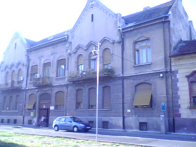 Casă în ARAD -1906, Str. Mihai Eminescu nr. 36.